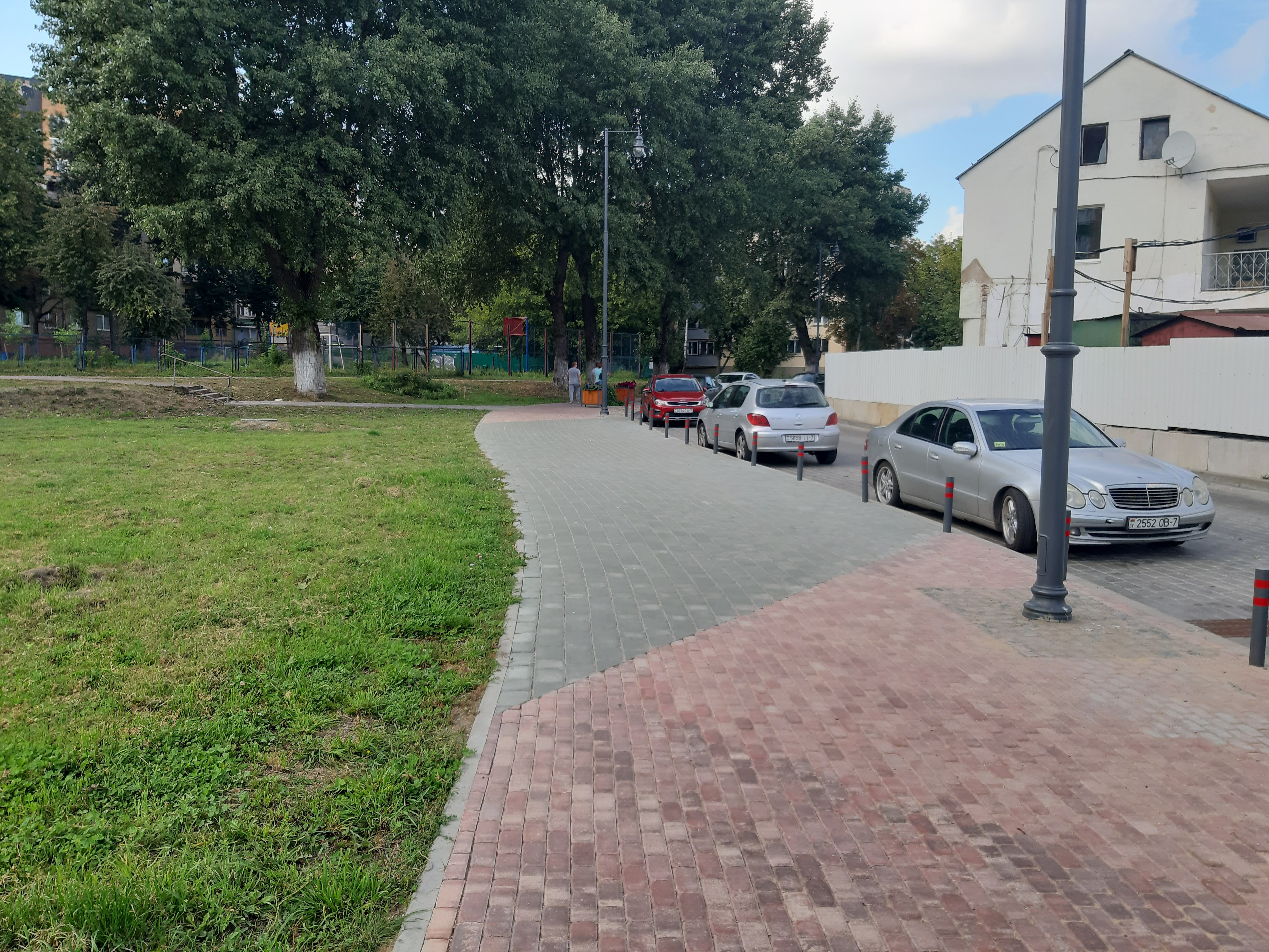 Мінск. Ракаўская прадмесце (жнівень 2019)